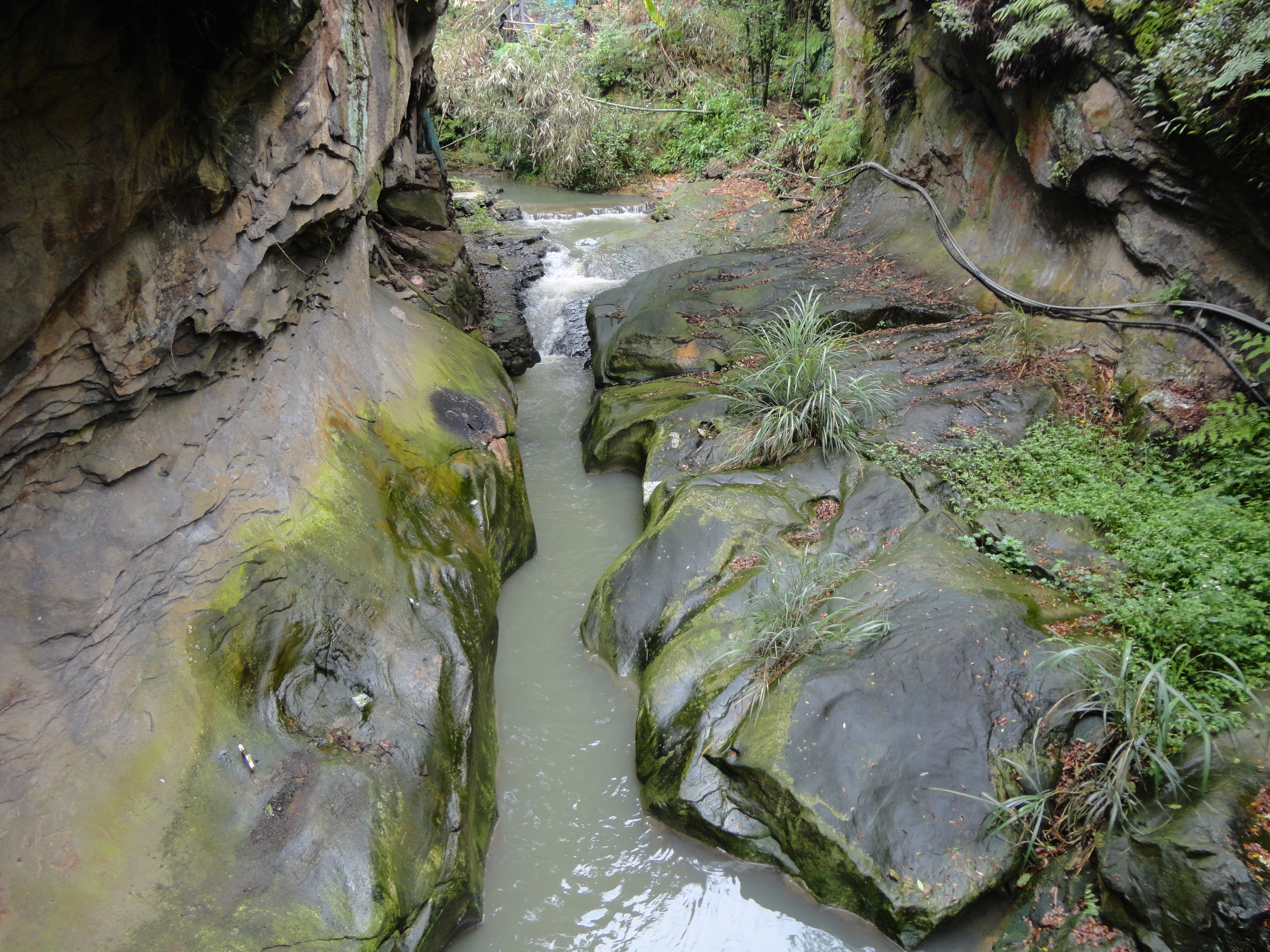 新北市中和區南勢角溪上游的石門溝，拍攝地點在興南路三段路旁